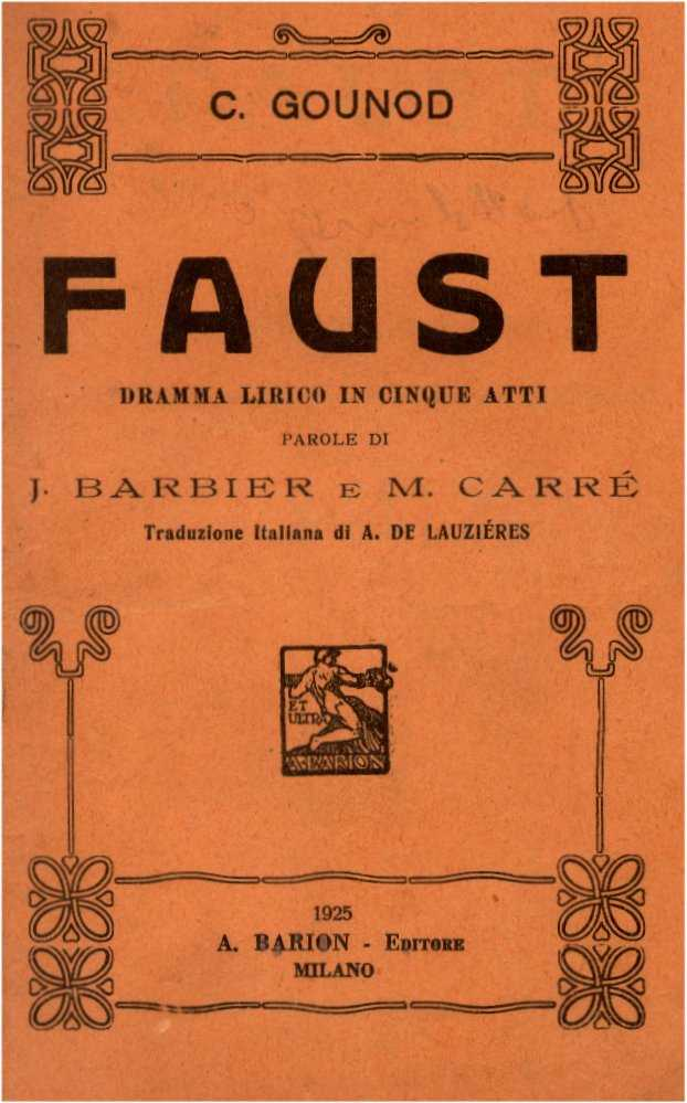 Copertina libretto "Faust" dramma dramma lirico in cinque atti parole di J. Barbier e M. Carrè traduzione italiana di A. De Lauziéres musica di Charles Gounod - editore Attilio Barion Sesto San Giovanni - Milano 1925